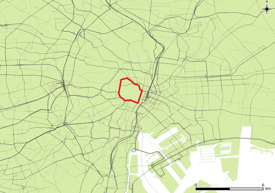 東京都市計画道路幹線街路環状第1号線